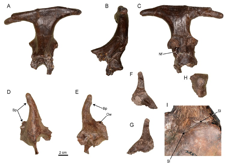 Cranial remains of Xenokeryx amidalae gen. et sp. nov. from La Retama. A, MNCN-74448 (holotype), occipital appendage in anterior view; B, MNCN-74448 (holotype), occipital appendage in lateral view; C, MNCN-74448 (holotype), occipital appendage in posterior view; D, MNCN-74449, right ossicone and supra-orbital region of a skull in latero-distal view; E, MNCN-74449, right ossicone and supra-orbital region of the skull in medial view; F, MNCN-74446, left juvenile ossicone and supra-orbital region of the skull in lateral view; G, MNCN-74446, left juvenile ossicone and supra-orbital region of the skull in medial view; H, MNCN-74447, left juvenile ossicone in apical view, showing its transversal section; I, MNCN-74449, detail of the ossicone-frontal bone contact showing the suture line (not to scale). Abbreviations: Bp, bumps; Nf, nuchal fossa; Ow, ossicone ‘wing’; Sl, suture line between ossicone and frontal bone.